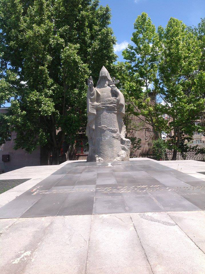 Ներսես Աշտարակեցու արձանը